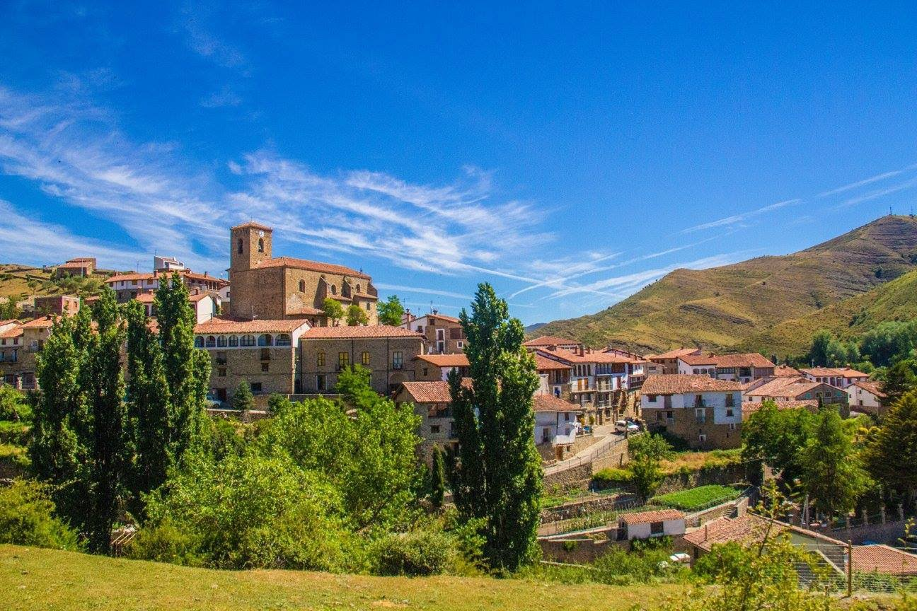 Bella panorámica del municipio de San Román de Cameros.